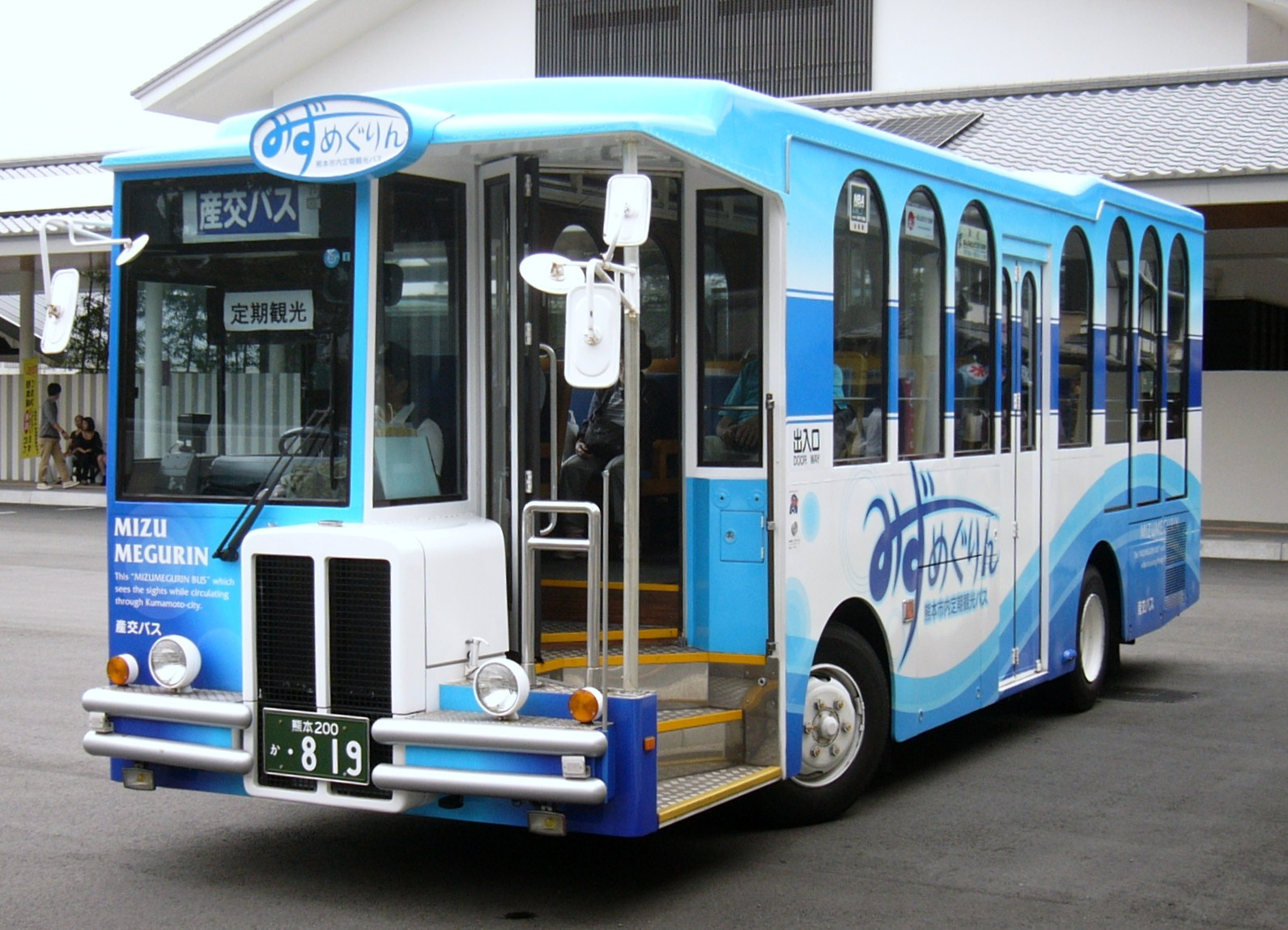 産交バス（熊本市内定期観光バス「みずめぐりん」）